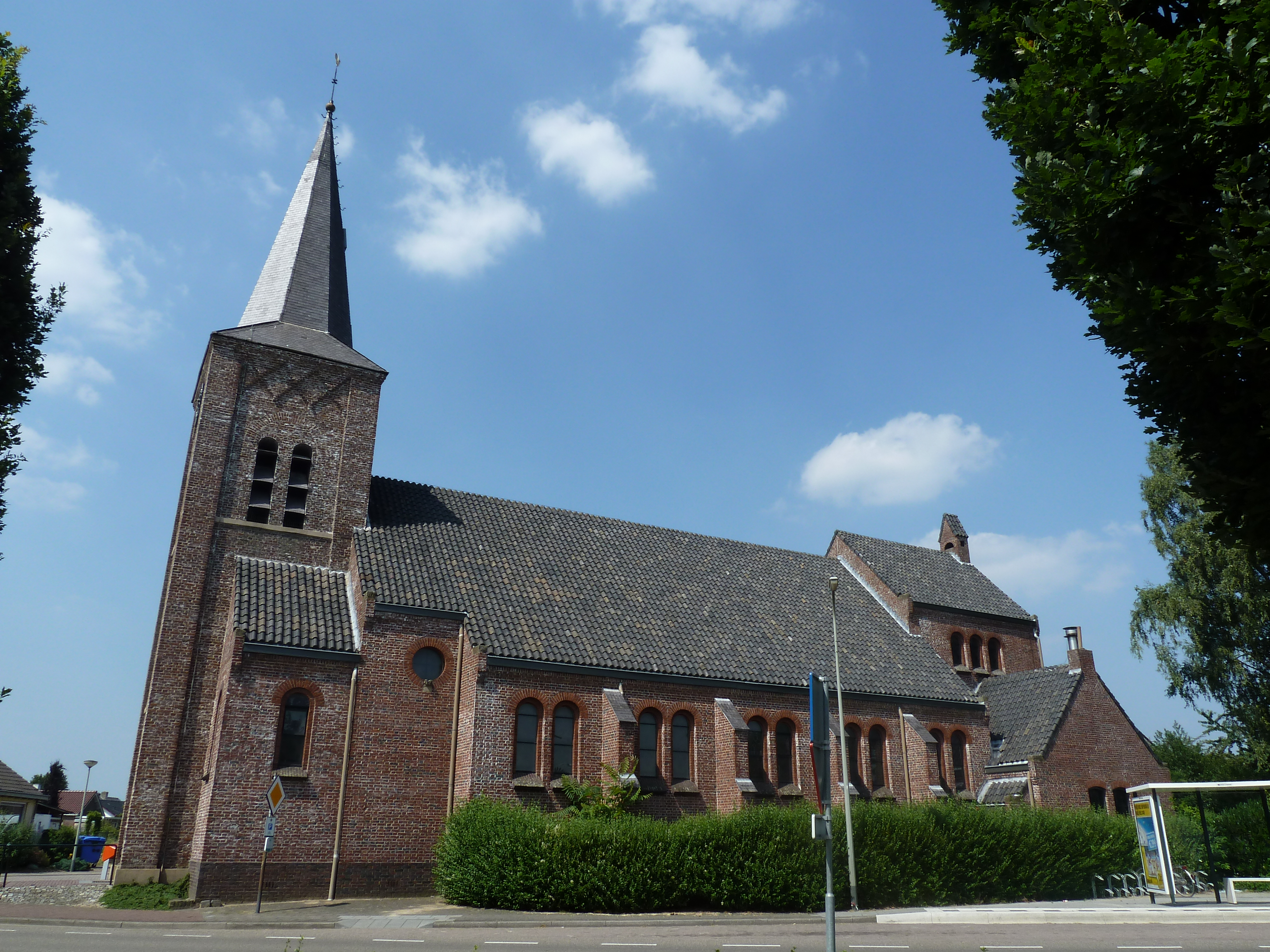 Sint-Margarethakerk, Ittervoort, Nederland